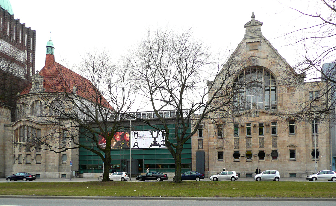 Fassade des Goseriedebades in Hannover